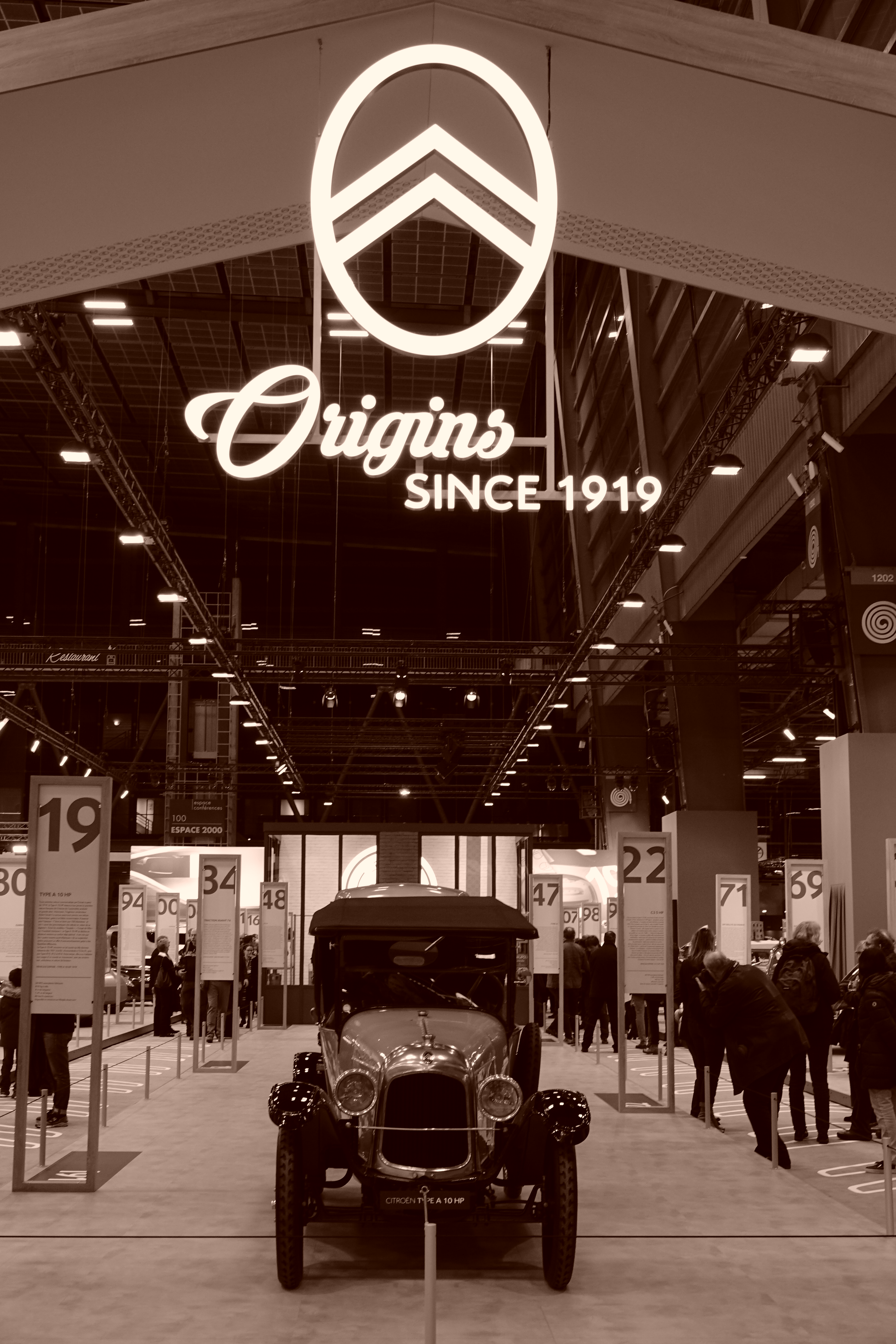 Exposition 100 ans de Citroen - Rétromobile 2019